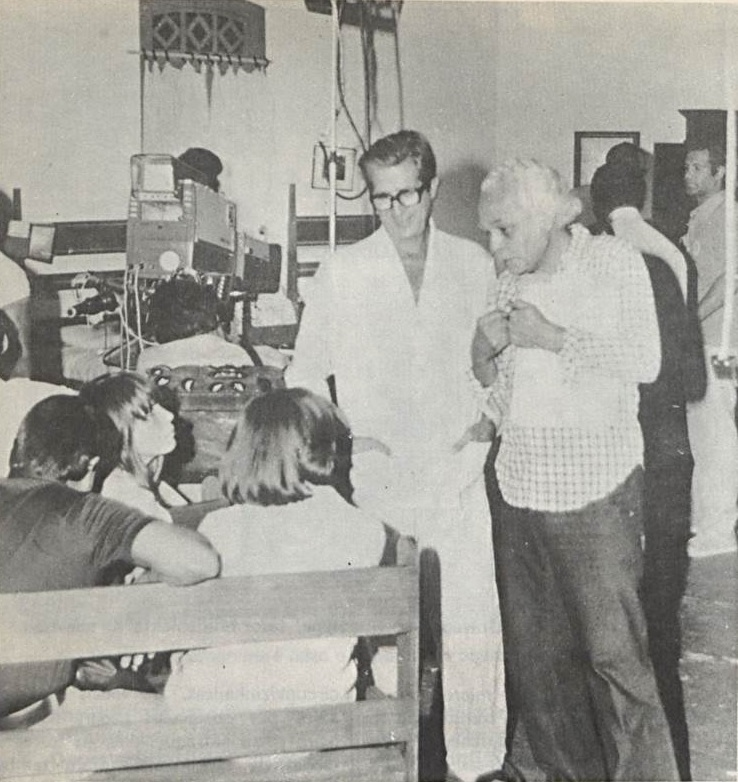 Ensaio de cena da telenovela "O Casarão" (1976). Da direita para a esquerda, Paulo Gracindo, não identificado, Daisy Lúcidi (de costas) e Renata Sorrah.